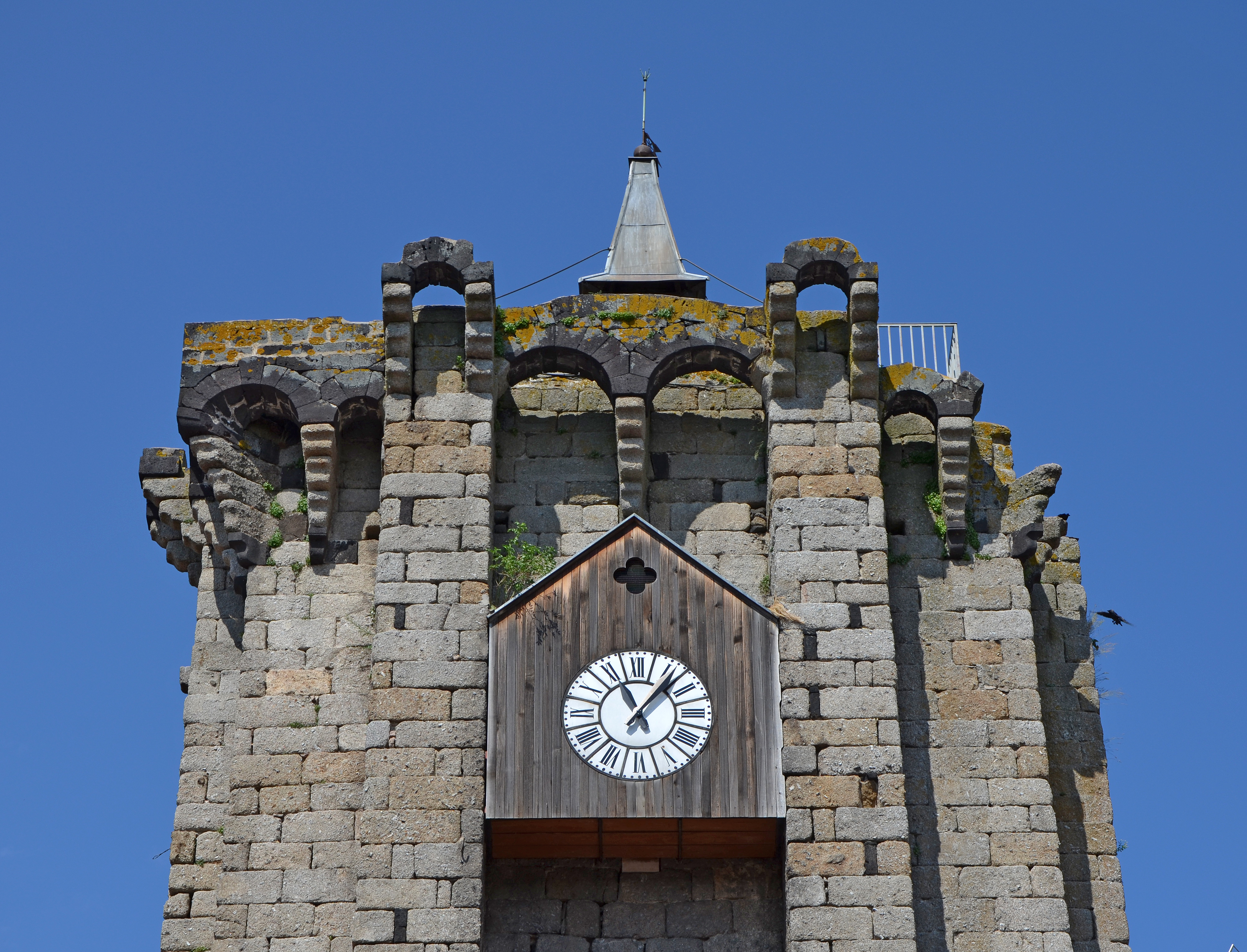 Tour des Anglais à Saugues, Haute-Loire, France .